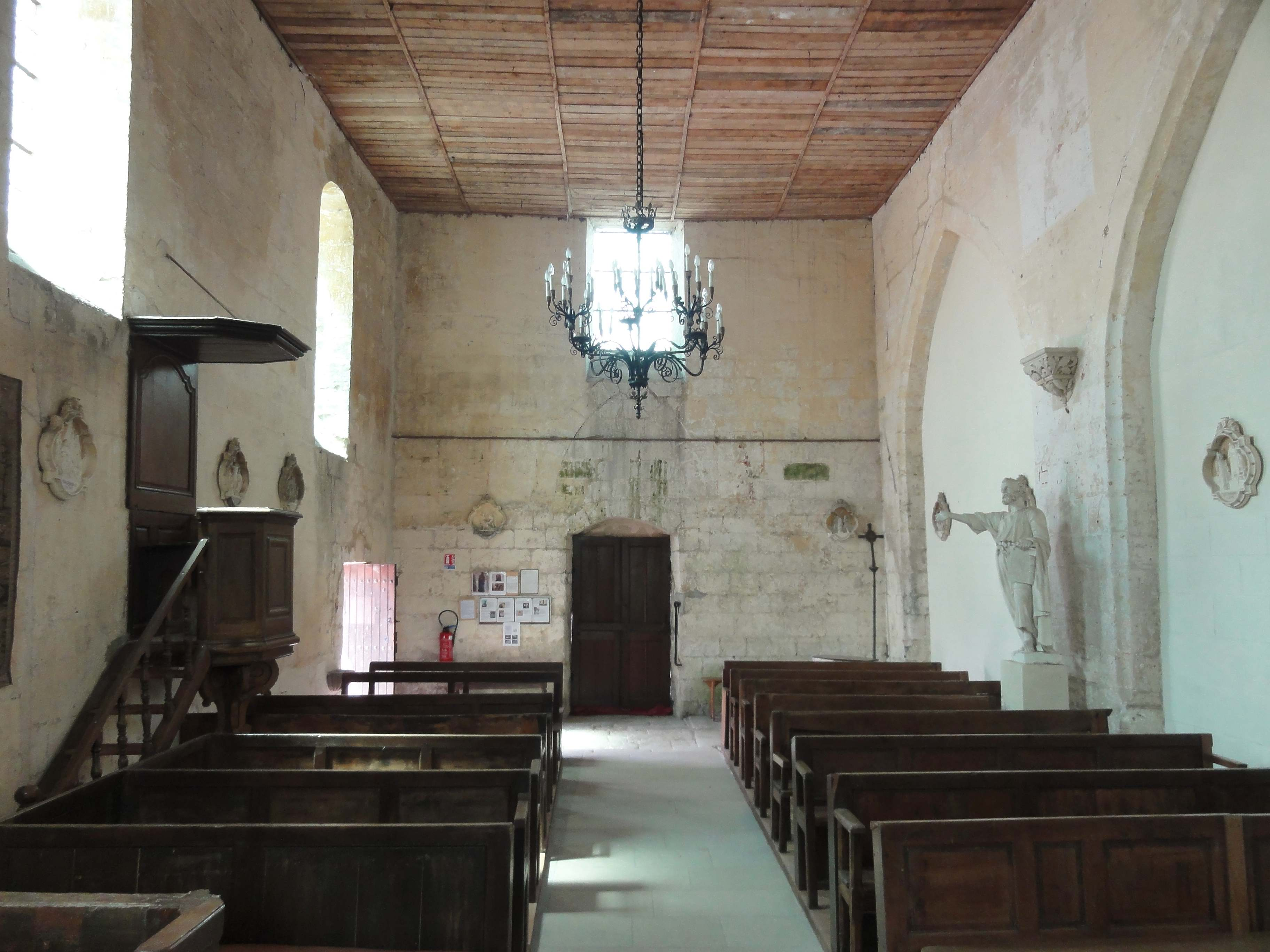 Intérieur de l'église (voir titre).